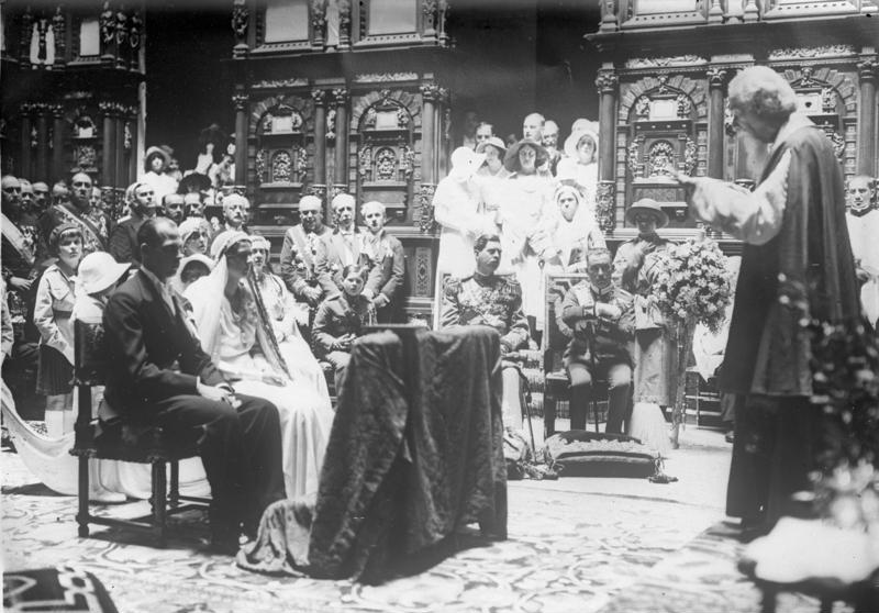 Die grosse Hochzeit im rumänischen Königshause! Die Hochzeit der rumänischen Prinzessin Ileana mit dem Herzog von Habsburg wurde in Schloss Pelesch in Sinaja in der Nähe von Bukarest pomphaft gefeiert. Die feierliche Trauung im Schloss Pelesch in Sinaia. Von links nach rechts: das Brautpaar Herzog Anton von Habsburg, Prinzessin Ileana, Erbprinz Michael, König von Rumänien und Erzherzog Leopold Salvator, der Vater des Bräutigams.